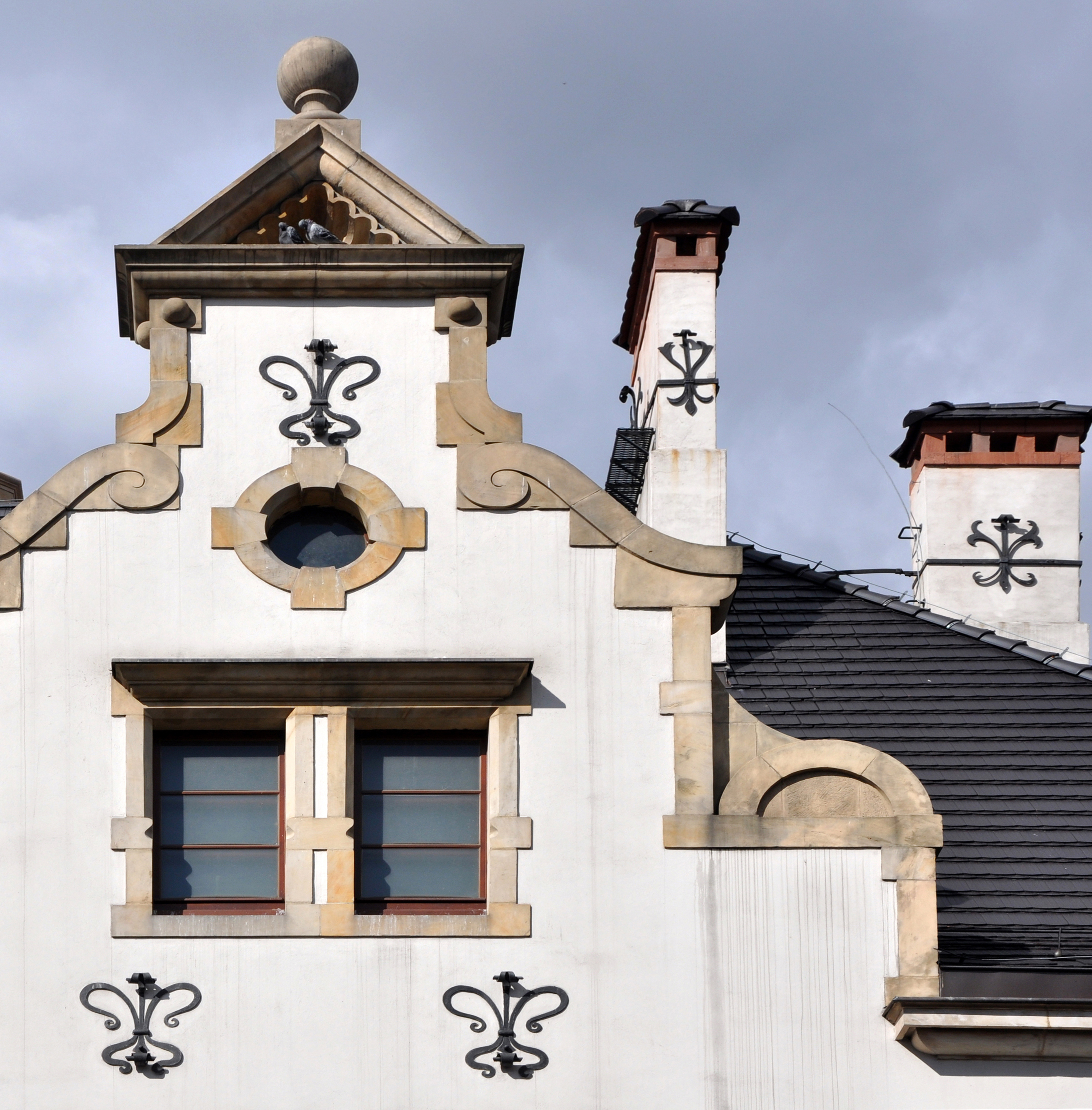 Ziębice, ratusz, XIV, XVI, XIX